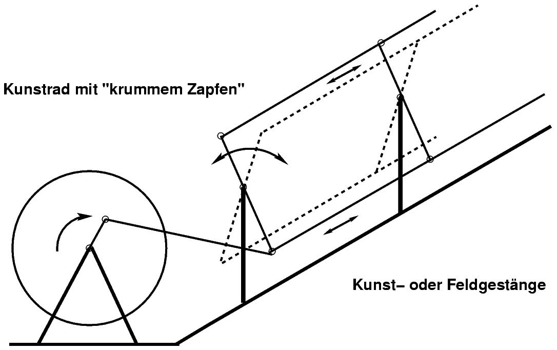 Prinzip des Kunstgestänges